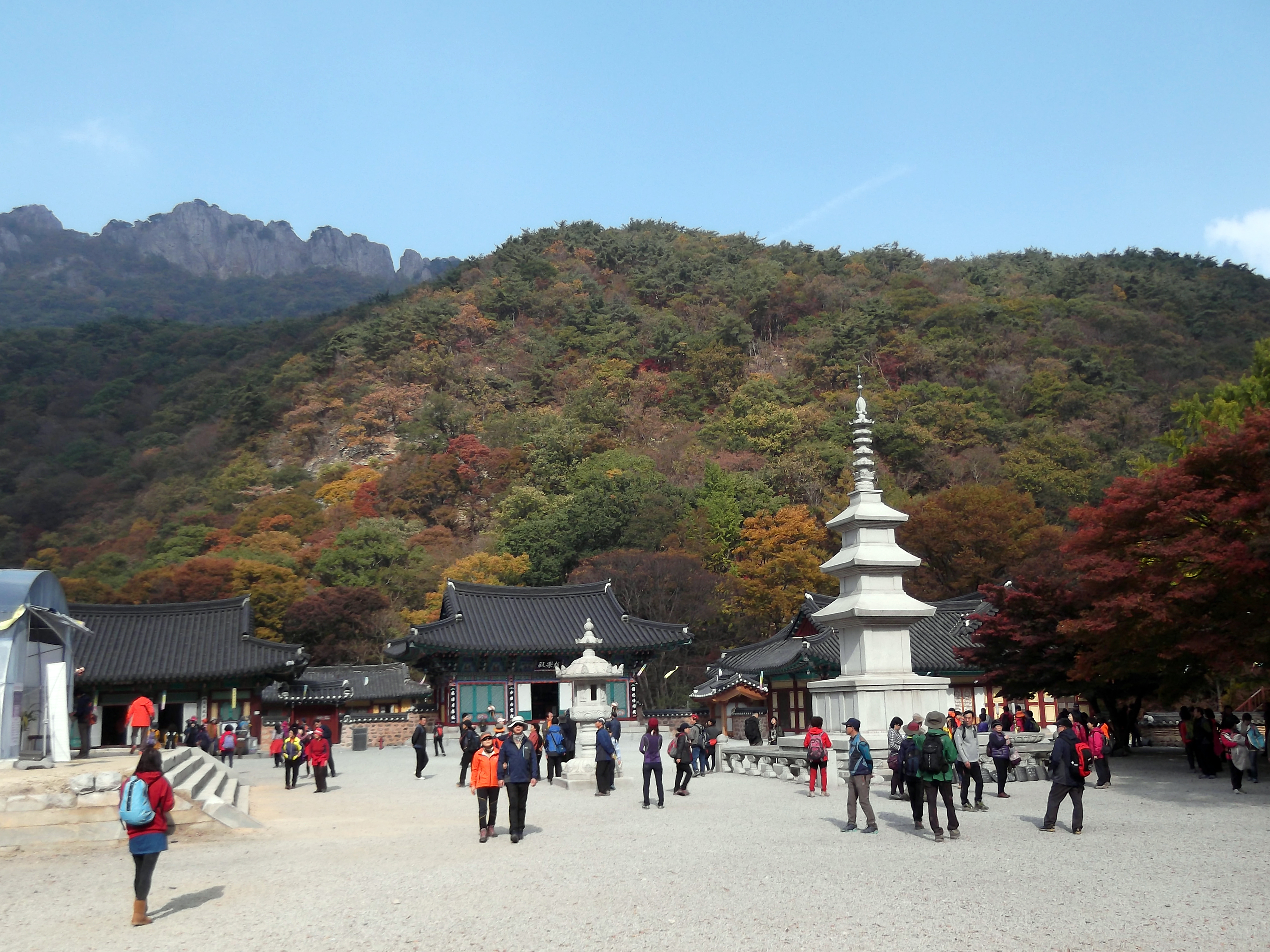 Naejangsan-Nationalpark, mit Tempel Naejangsa im Vordergrund